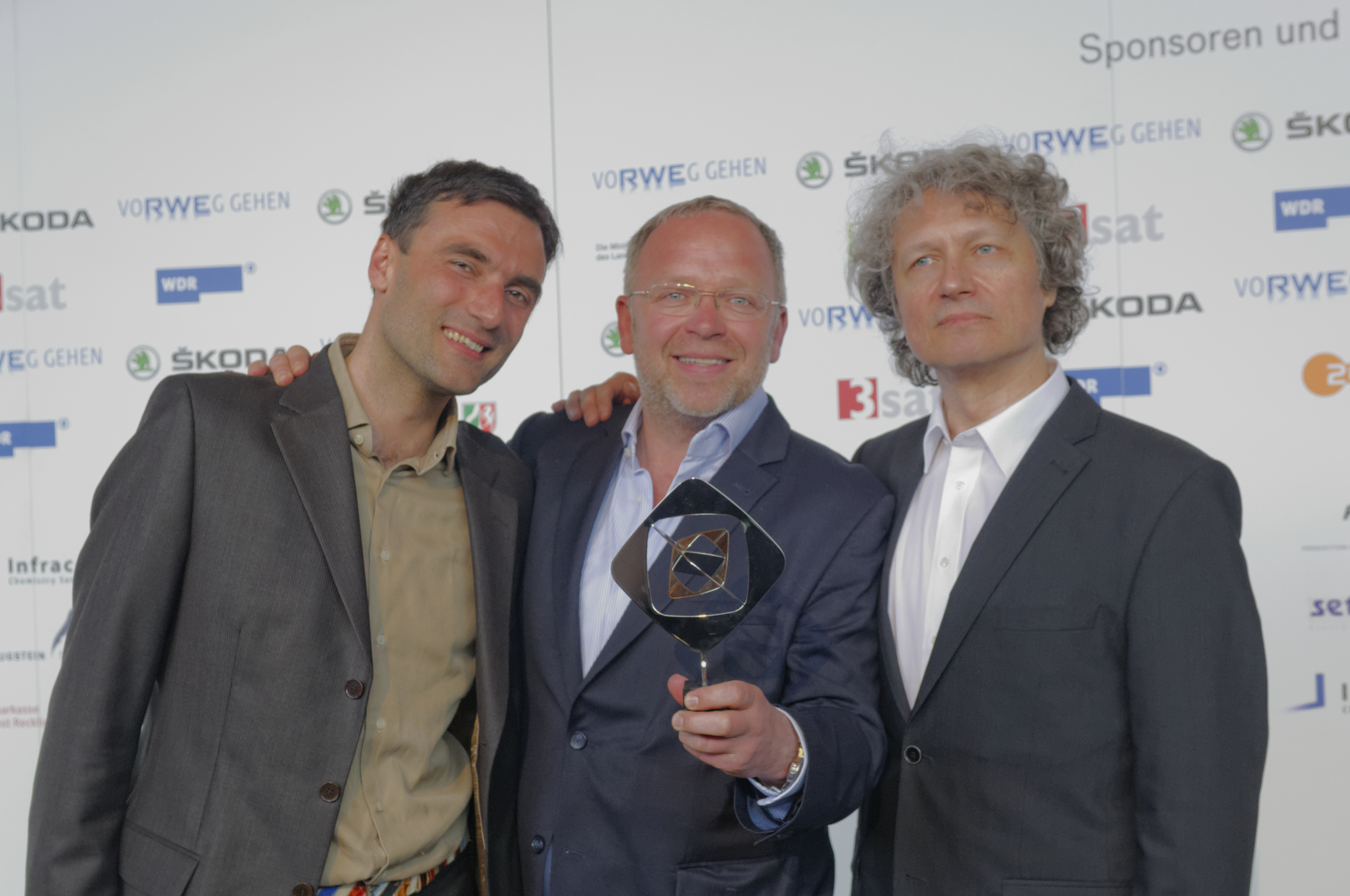 Grimme-Preis 2013 Pressekonferenz und Preisverleihung